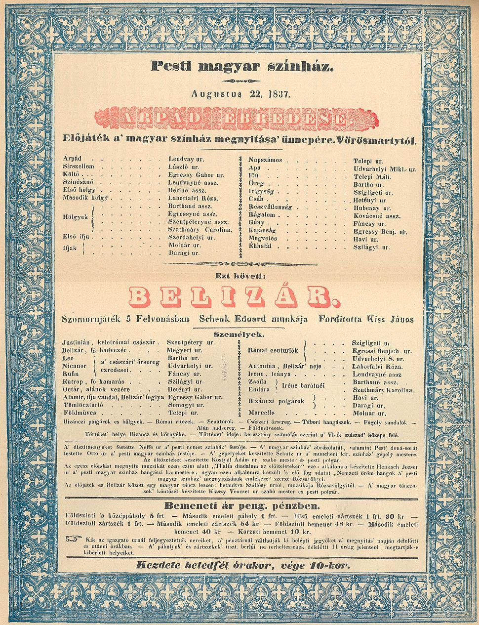 A Pesti Magyar Színház (1840-től Nemzeti Színház) megnyitó előadásának szinlapja